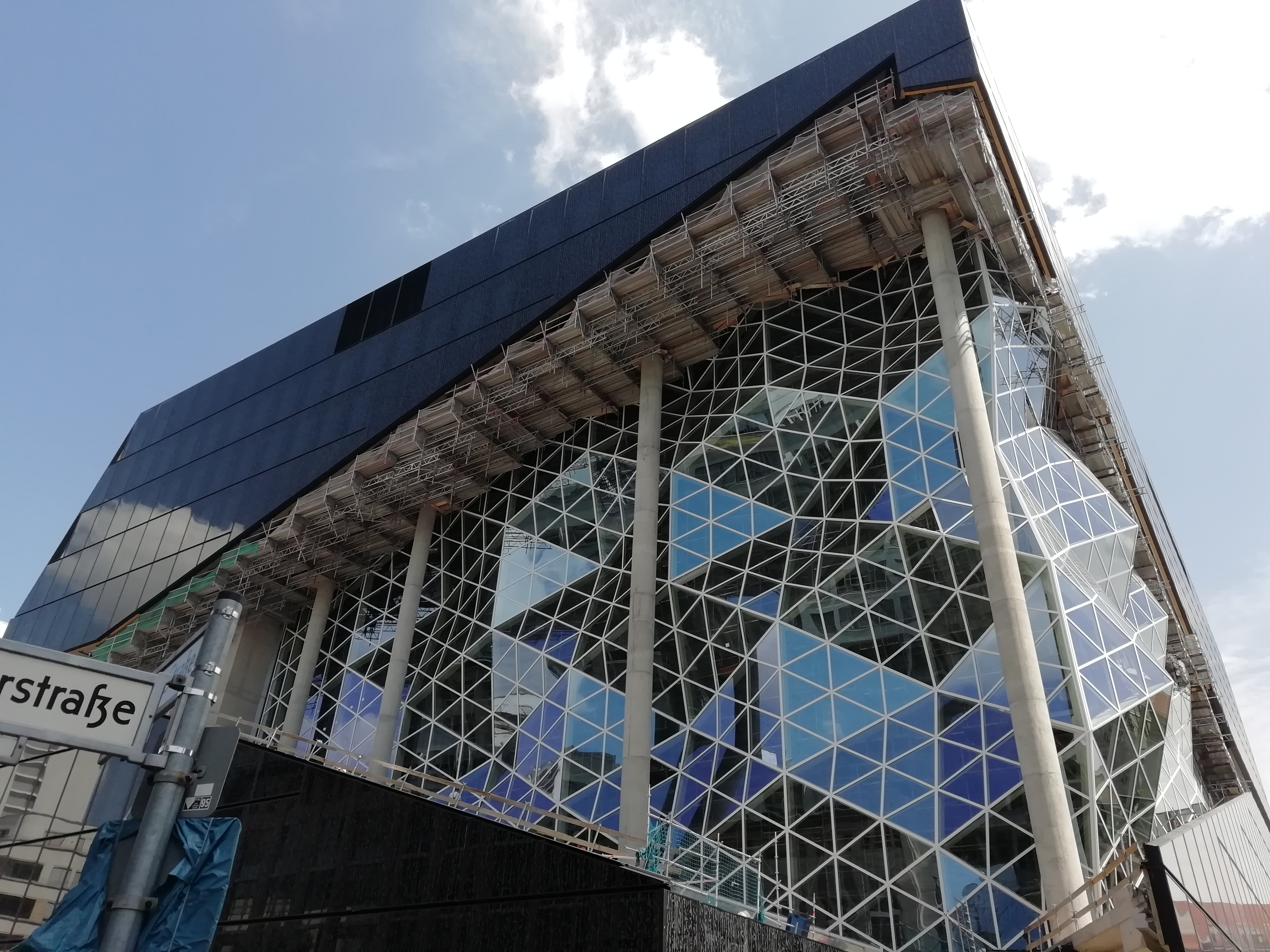 Axel-Springer-Neubau Berlin, 1. Juli 2019